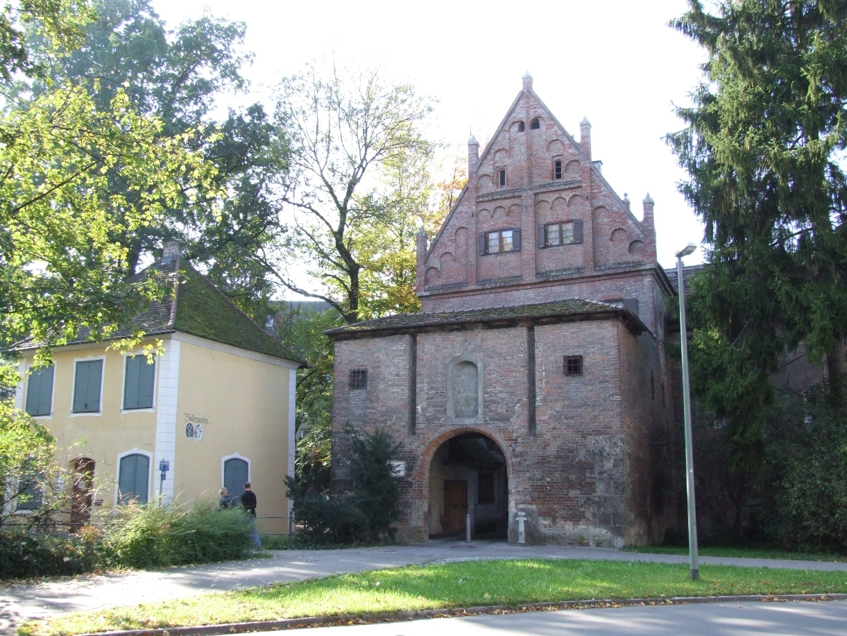 Das Zollergartenhäuschen neben dem Einlaß